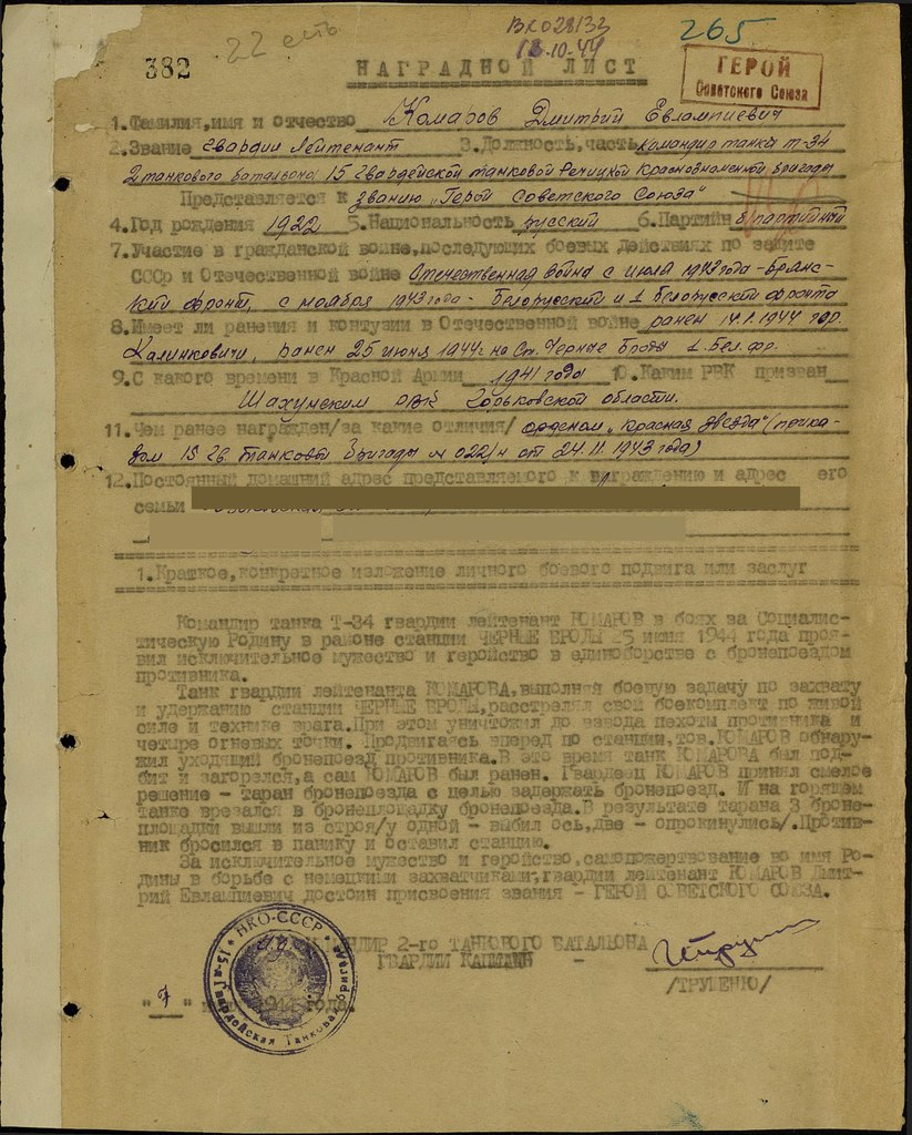 Наградной лист Дмитрия Евлампиевича Комарова